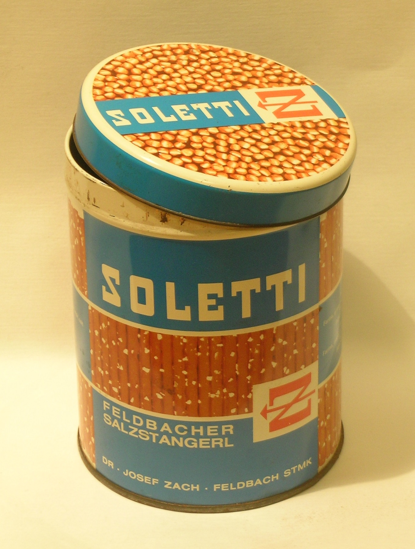 Puszka słonych paluszków Soletti